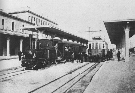 Stazione di Modena Piazza Manzoni con tram